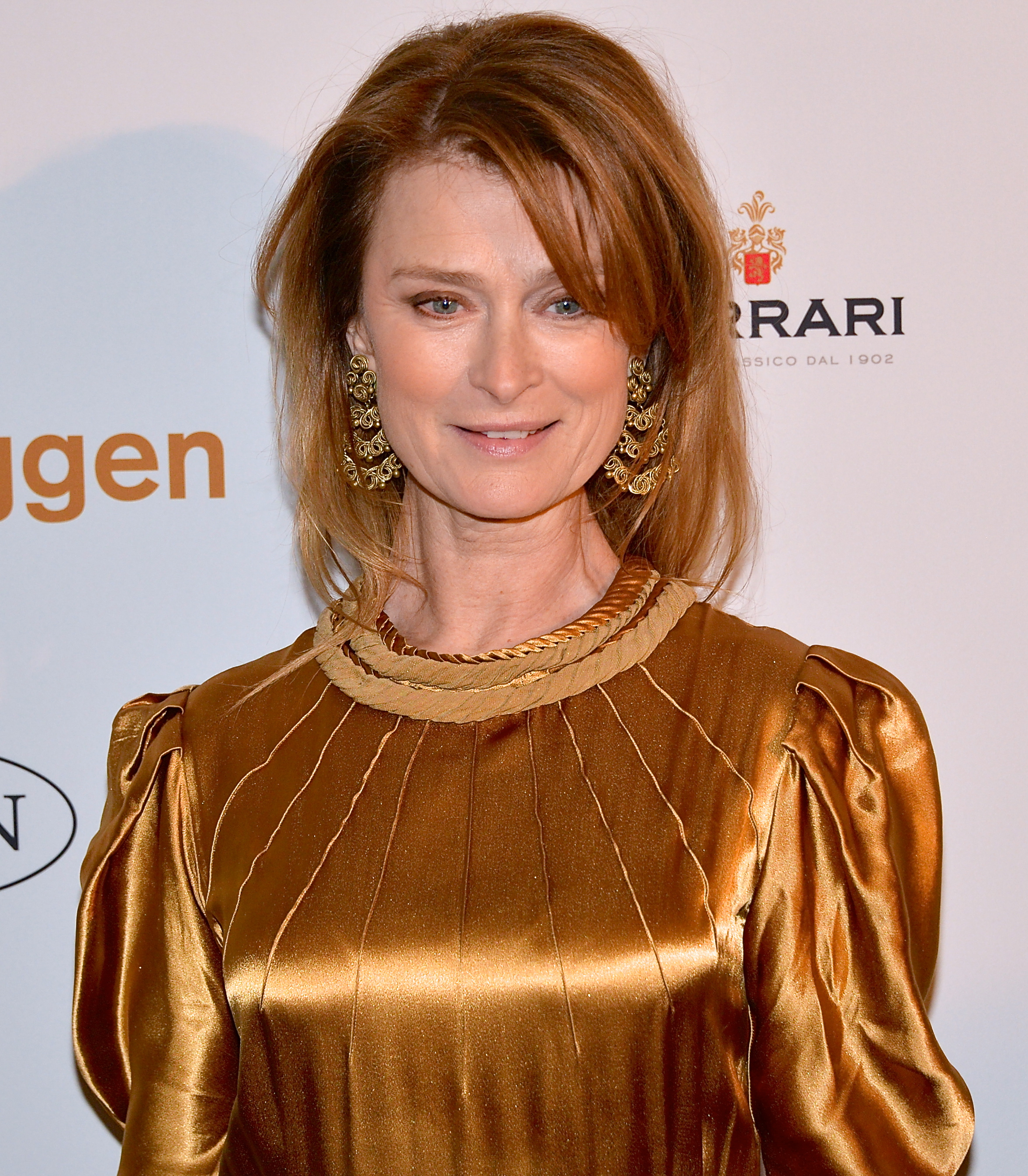 Lena Endre på Guldbaggegalan den 21 januari 2013.